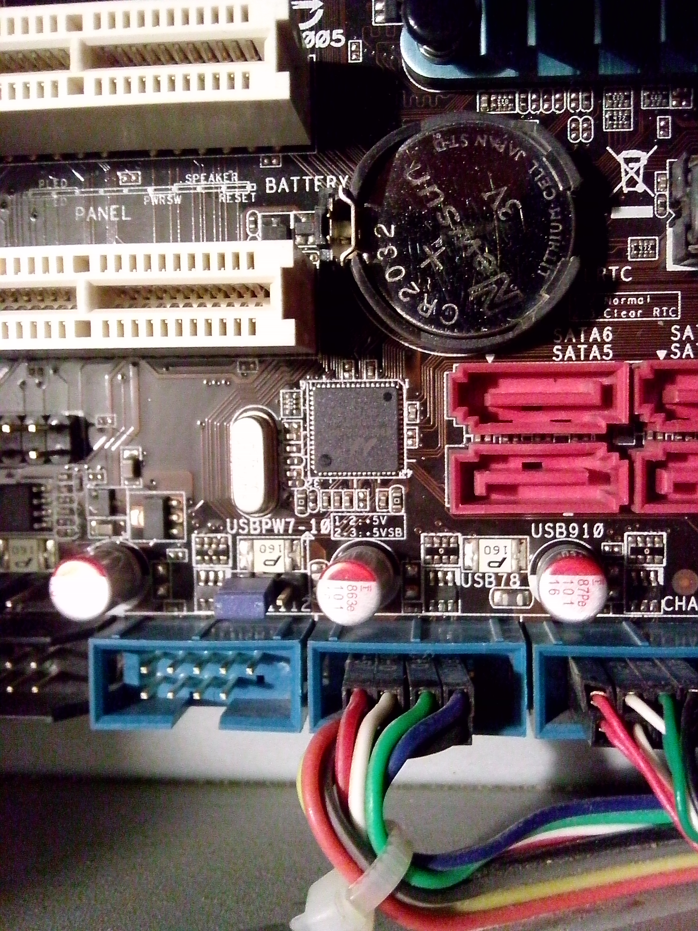 Материнская плата ASUS P5Q SE